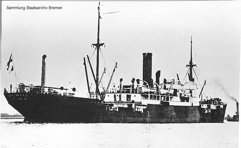 Das Frachtschiff Ehrenfels (3) der DDG Hansa während des ersten Weltkrieges